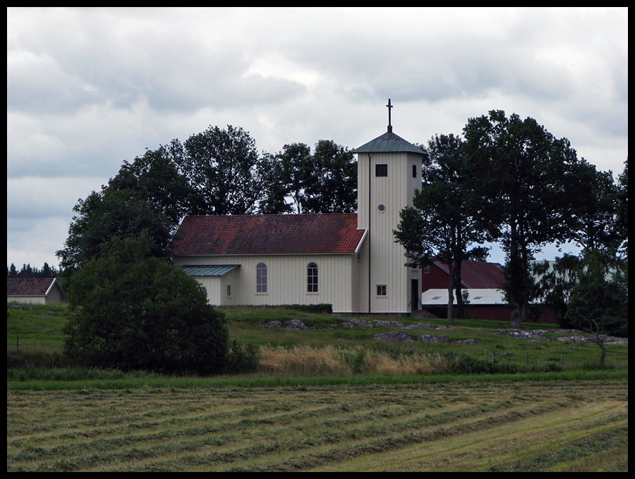 Malma kapell